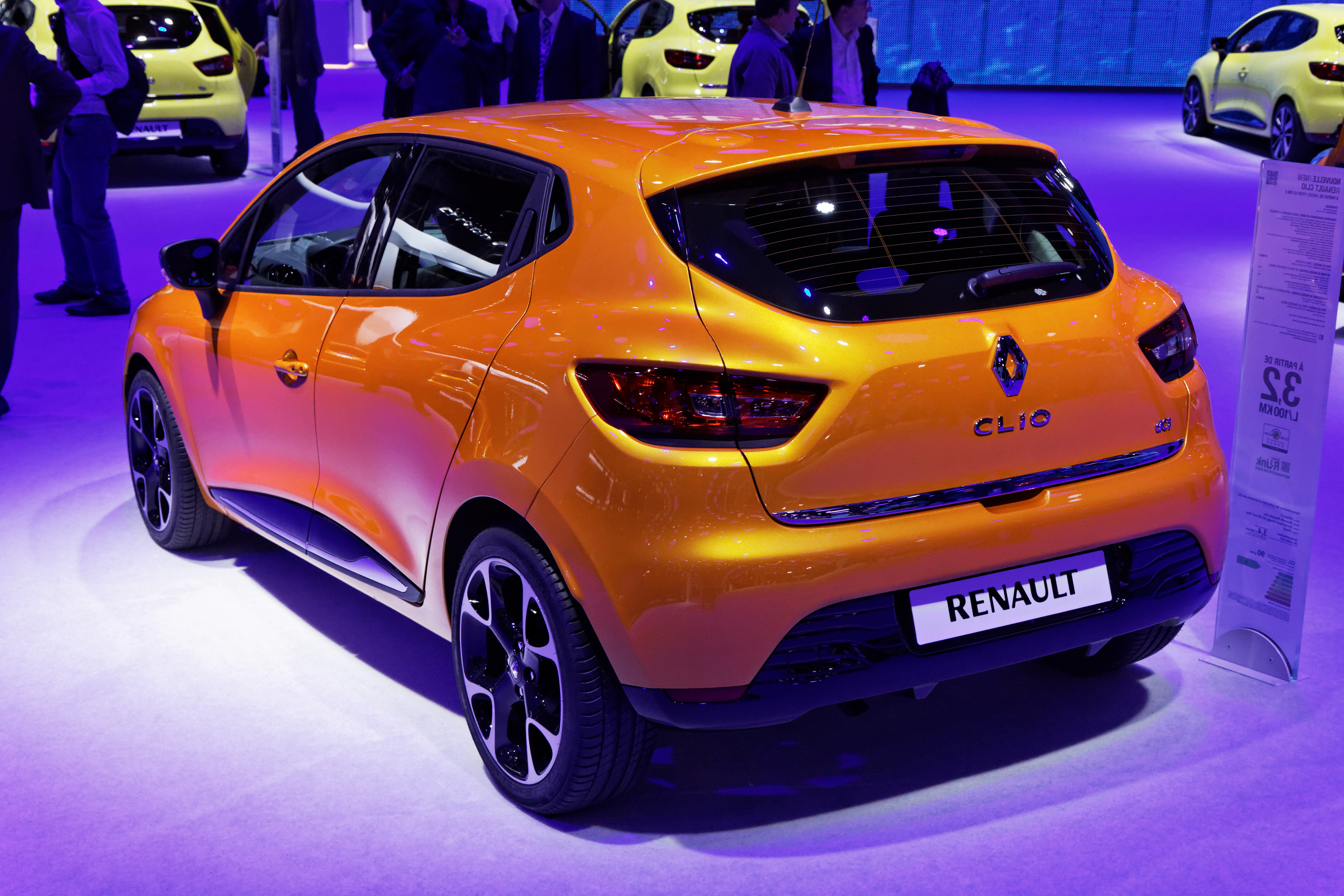 Une Renault Clio présentée lors du Mondial de l'Automobile de Paris 2012.